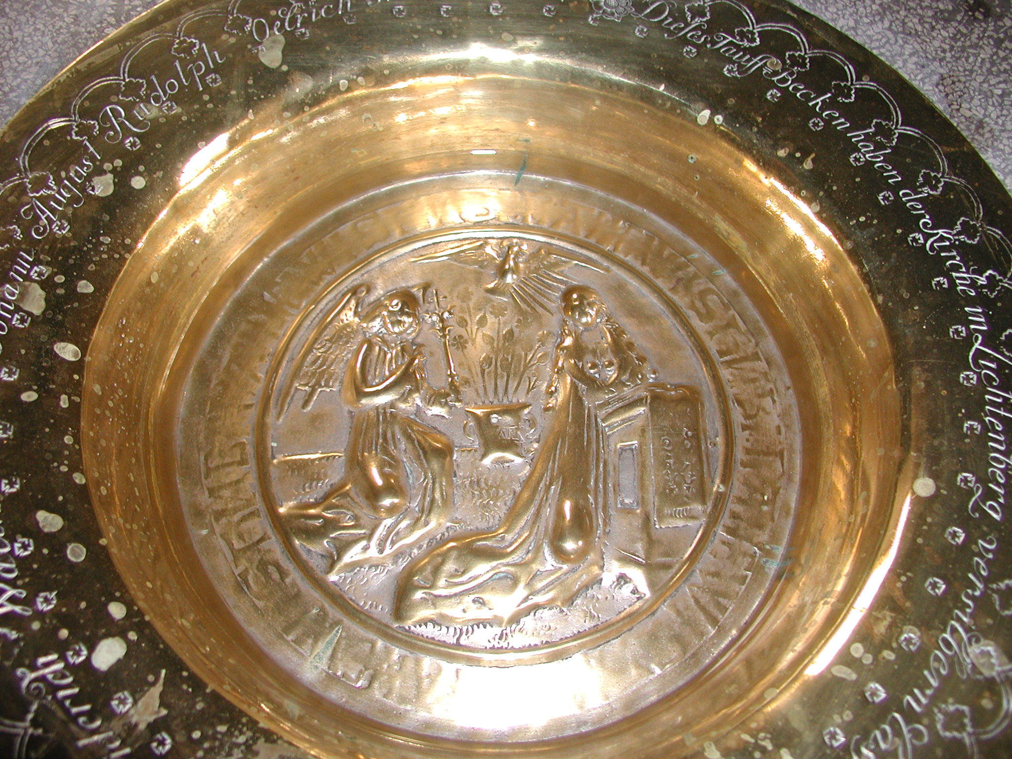 Die Taufschale mit dem Sujet Maria Verkündigung